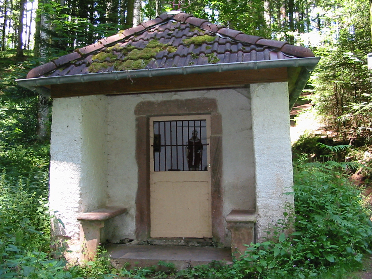 Chapelle Saint Gondelbert, cachée au cœur de la forêt, à Provenchères-sur-Fave, chef-lieu de canton du département des Vosges.